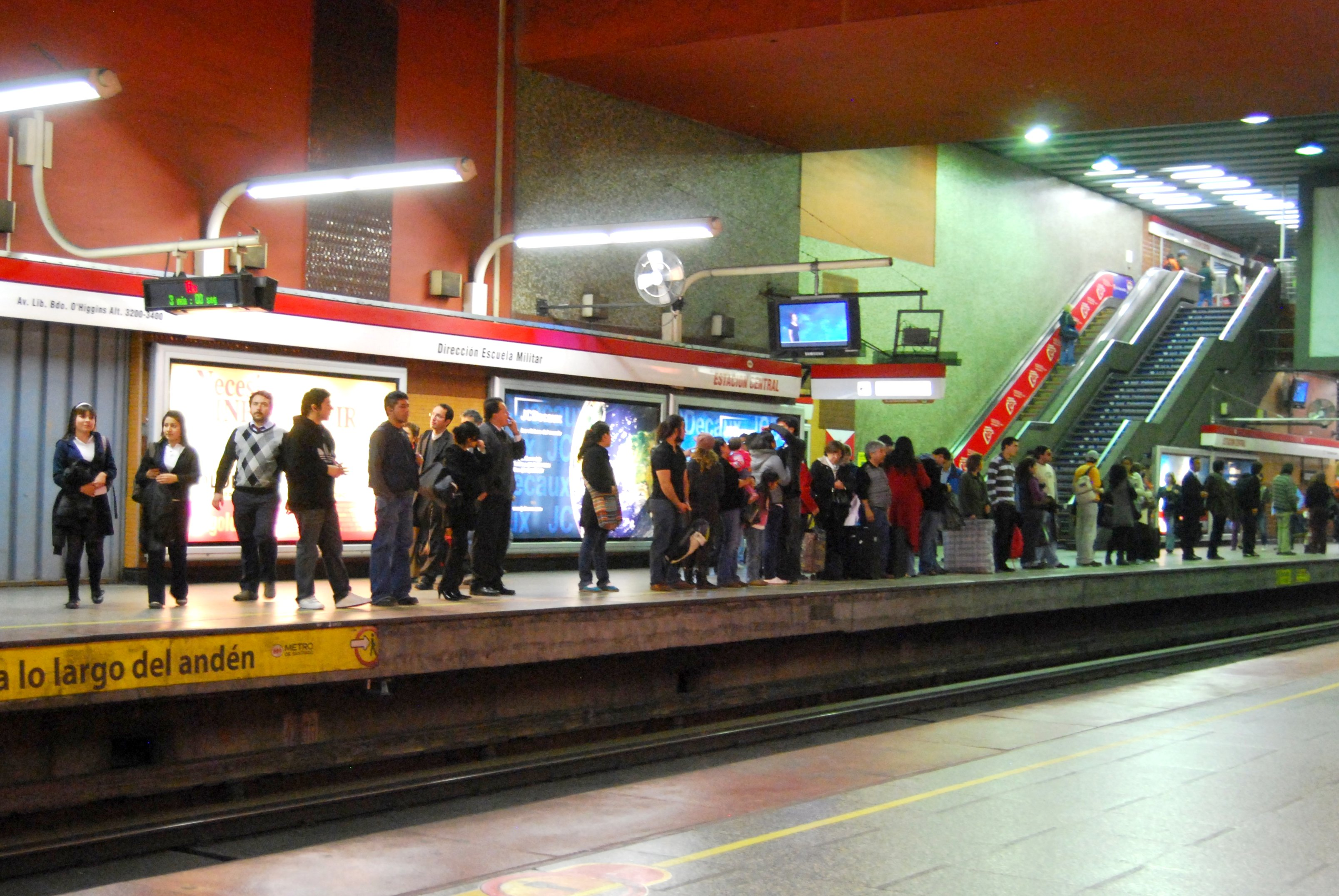 Estación Central del Metro de Santiago.